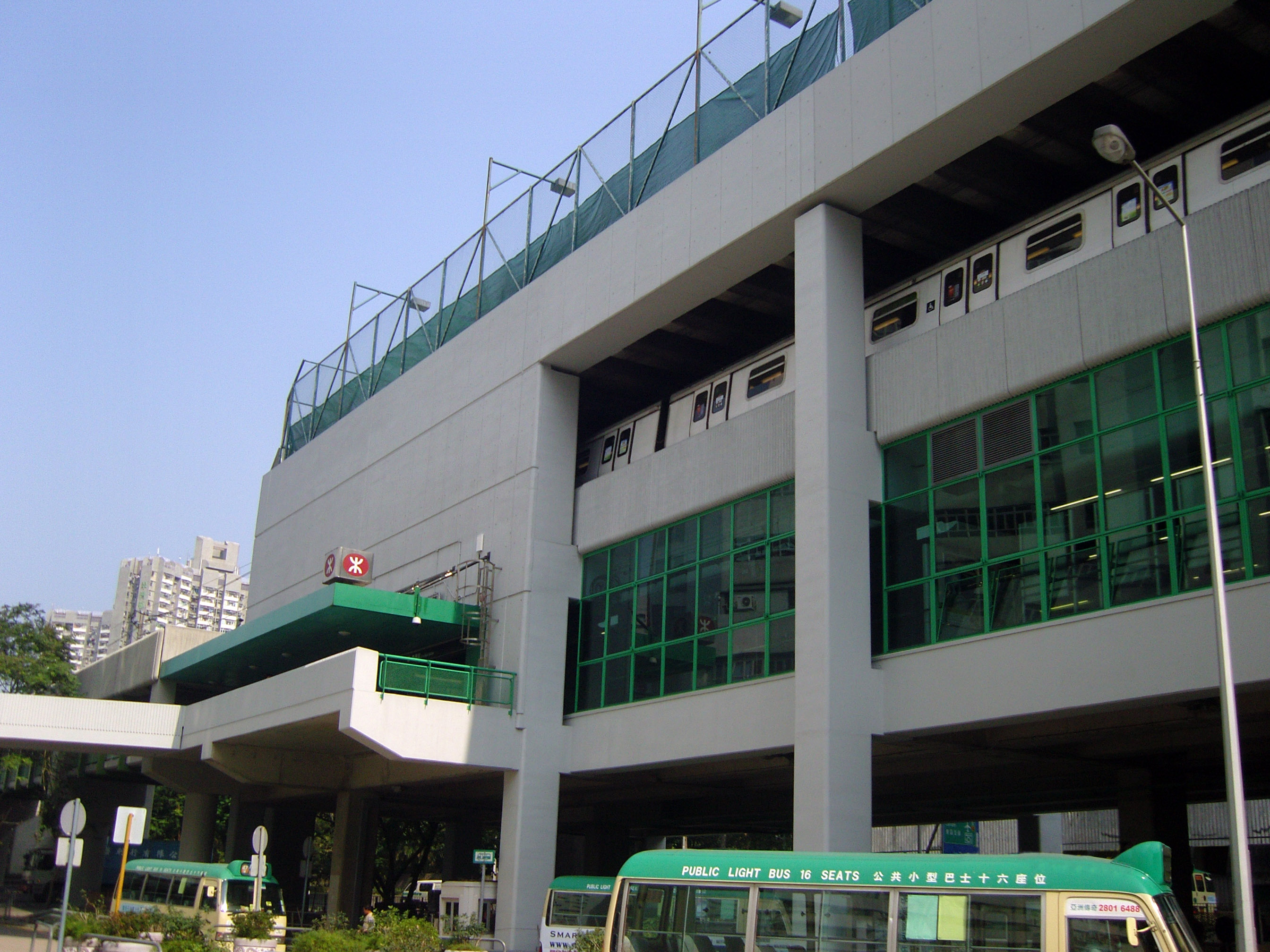 港鐵柴灣站外觀(2)